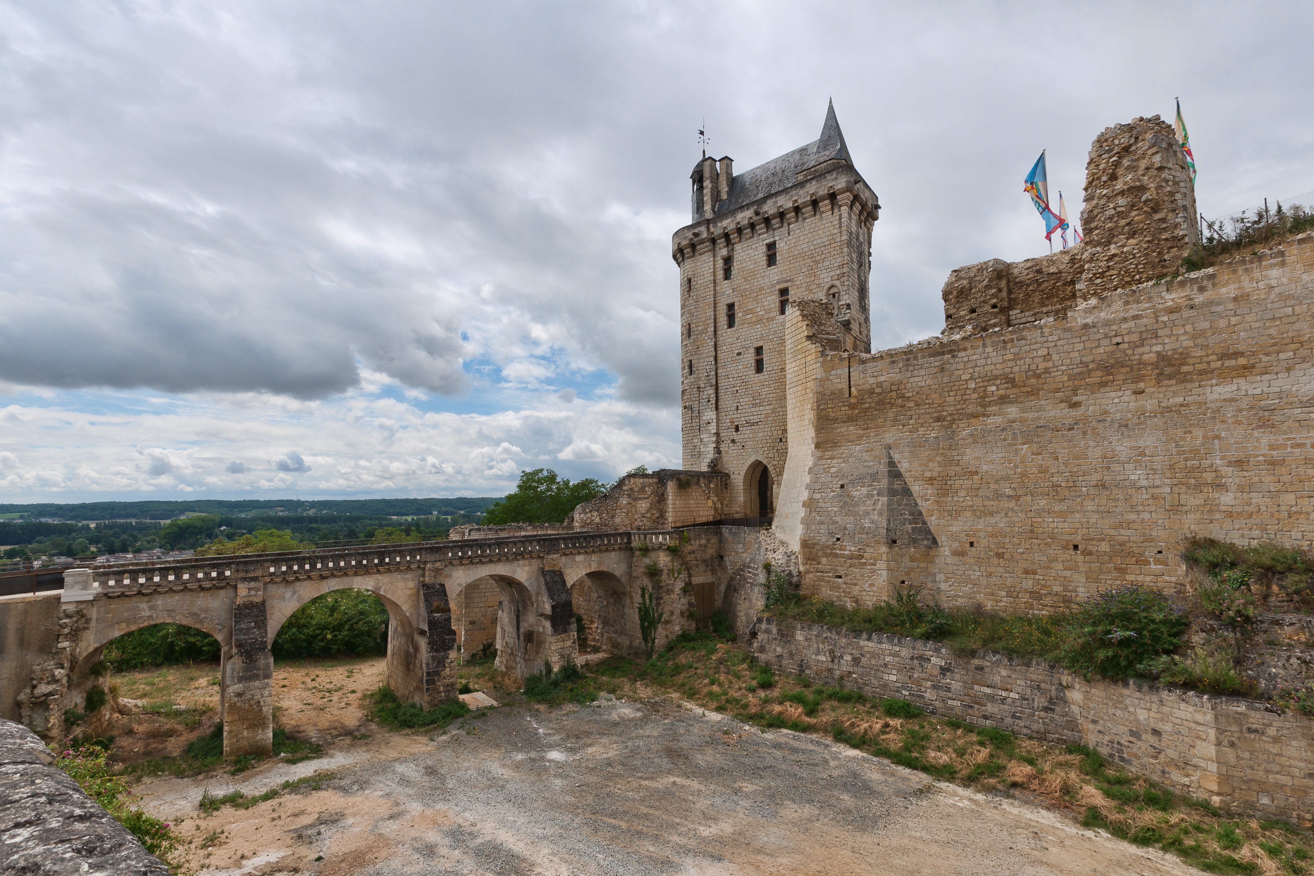 Chinon - Vue du Château et de la Tour de l'Horloge